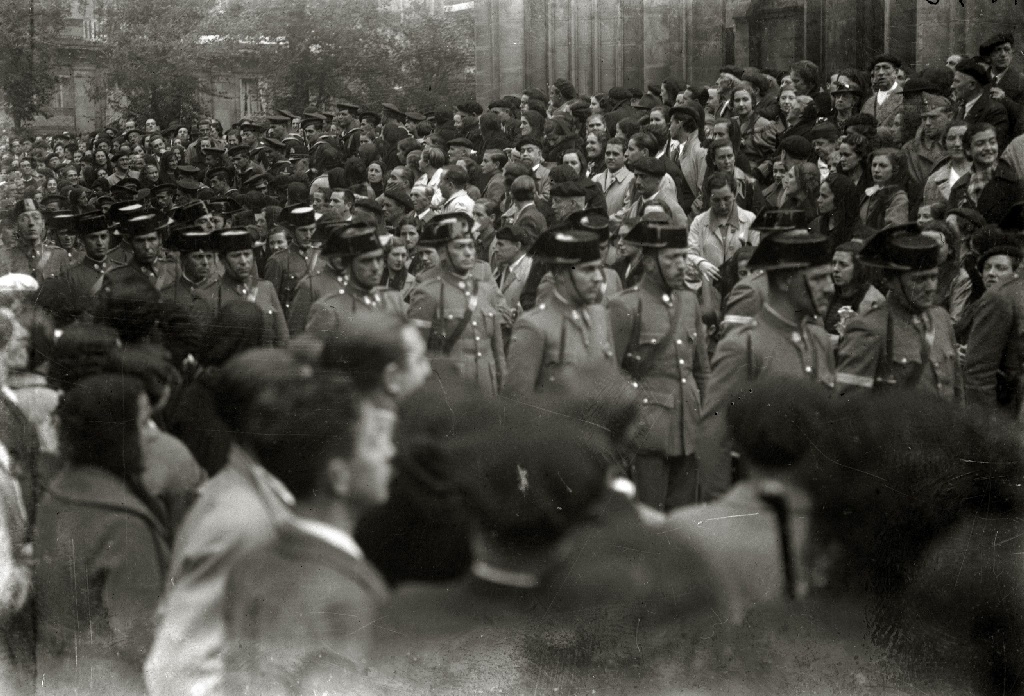 Título original: Desfile de miembros de la Guardia Civil por la plaza del Buen Pastor (1/1) Localización: San Sebastián (Guipúzcoa)